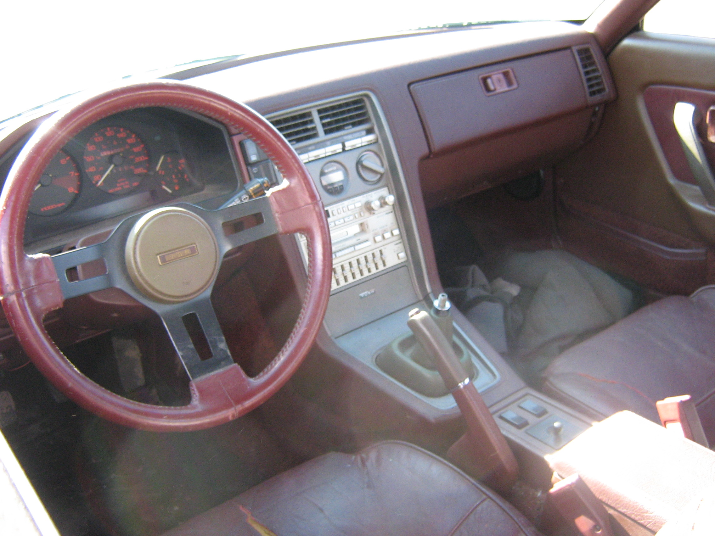 Mazda Rx-7 GSL-SE